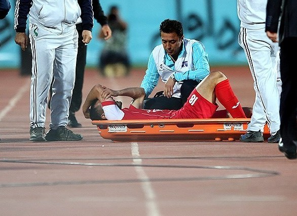 محسن ربیع‌خواه در مسابقه پرسپولیس با پارس جنوبی جم؛ او در این مسابقه مصدوم شد.